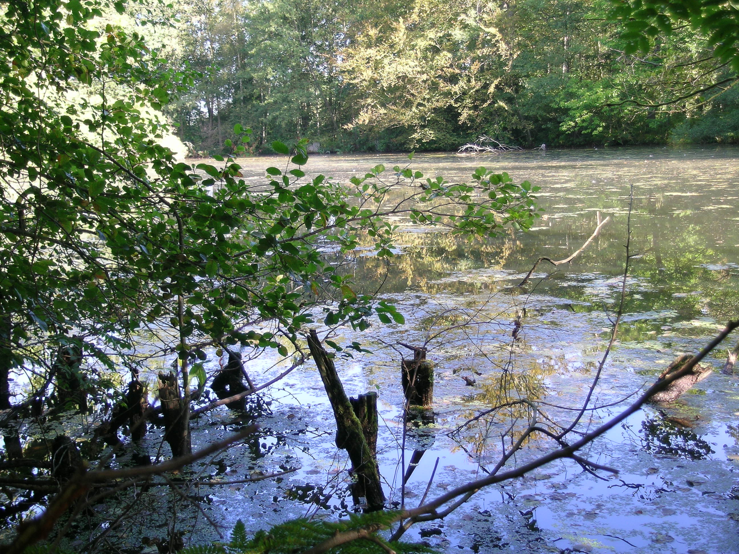 Teich beim Herrenhaus Gut Sunder Pond by Sunder Estate Manor House, Meißendorfer Teiche, Lower Saxony, Germany.